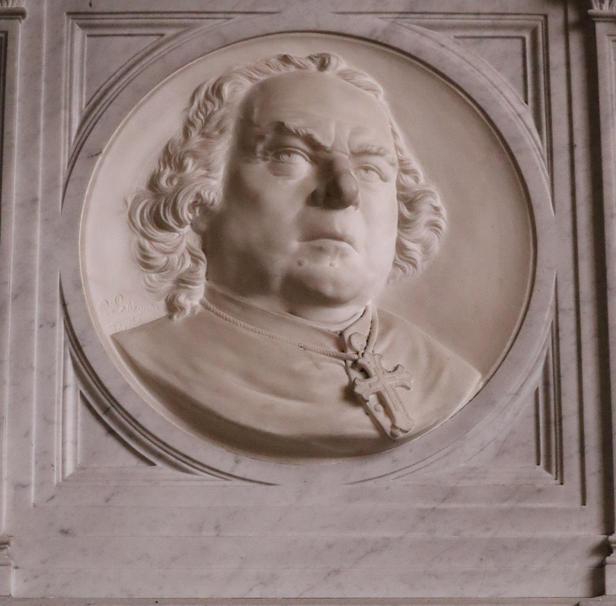 Église Saint-Seine de Corbigny (58). Monument abritant le cœur de Mgr Sergent, évêque de Quimper et Léon. Portrait du prélat.